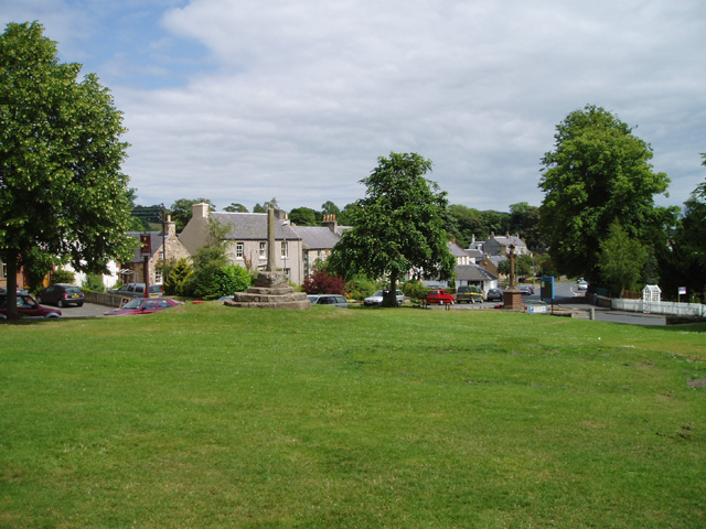 Ancrum village green